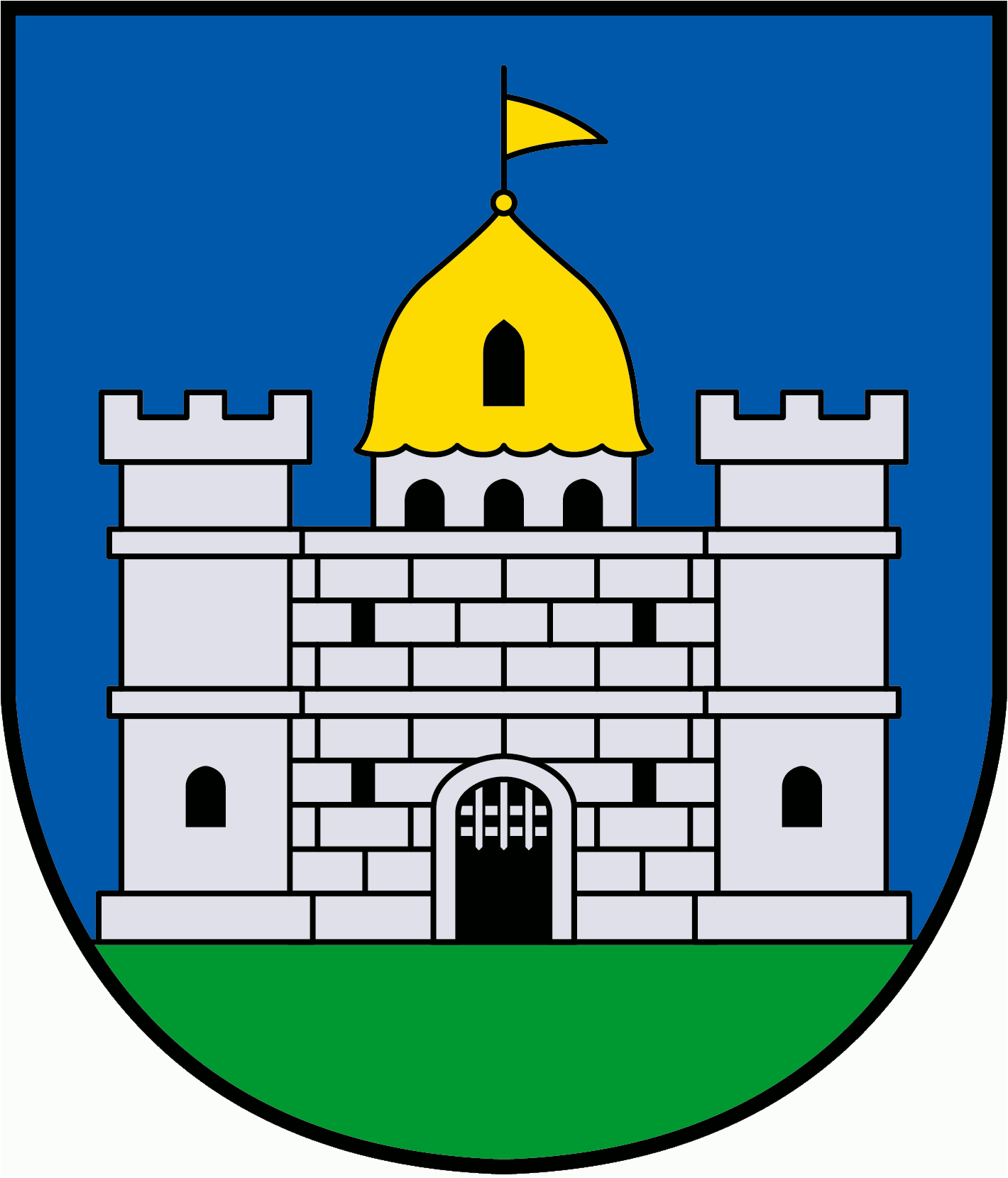 Wappen der steirischen Gemeinde Obdach